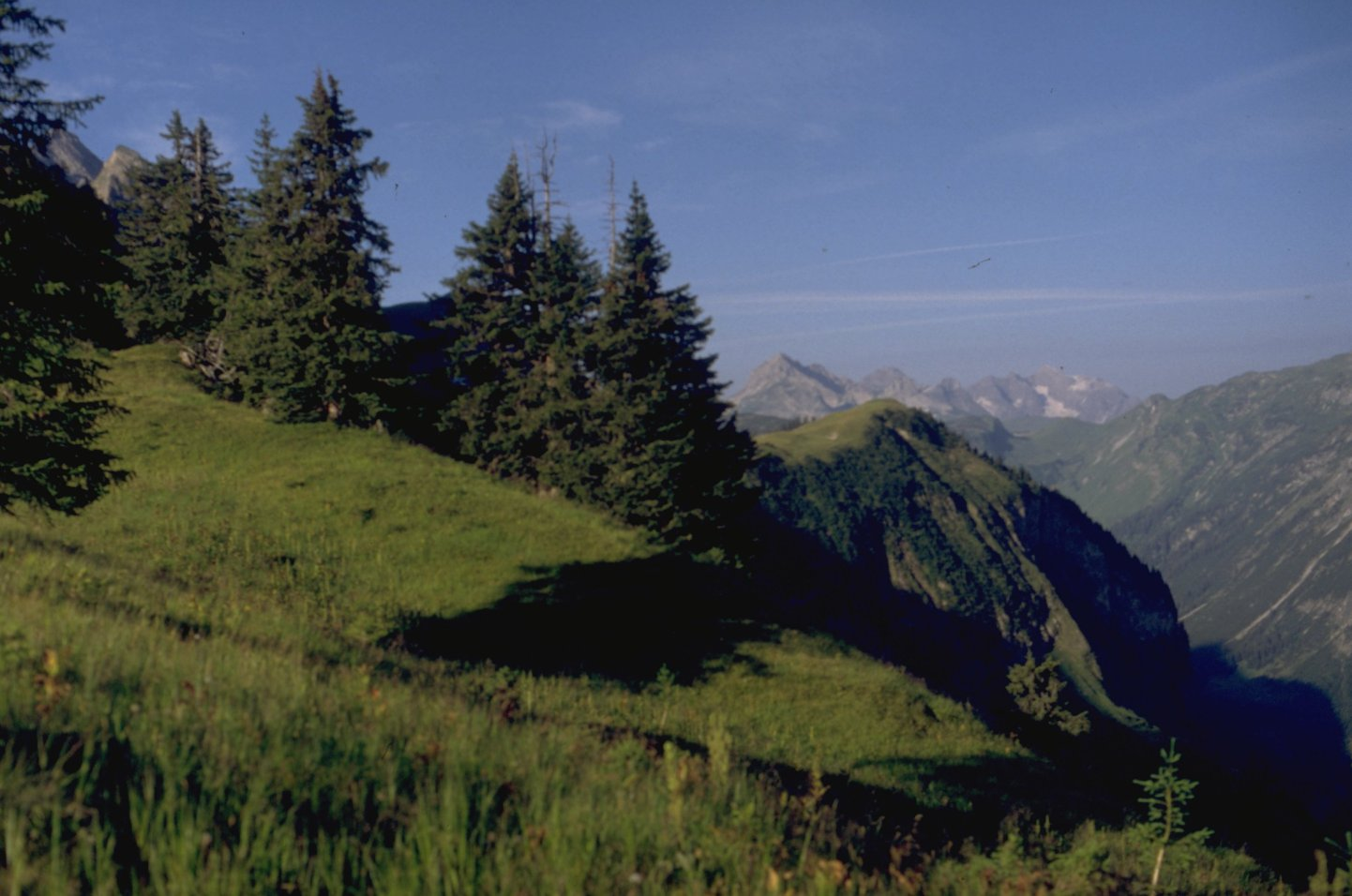 Kaenzele vom Habaum